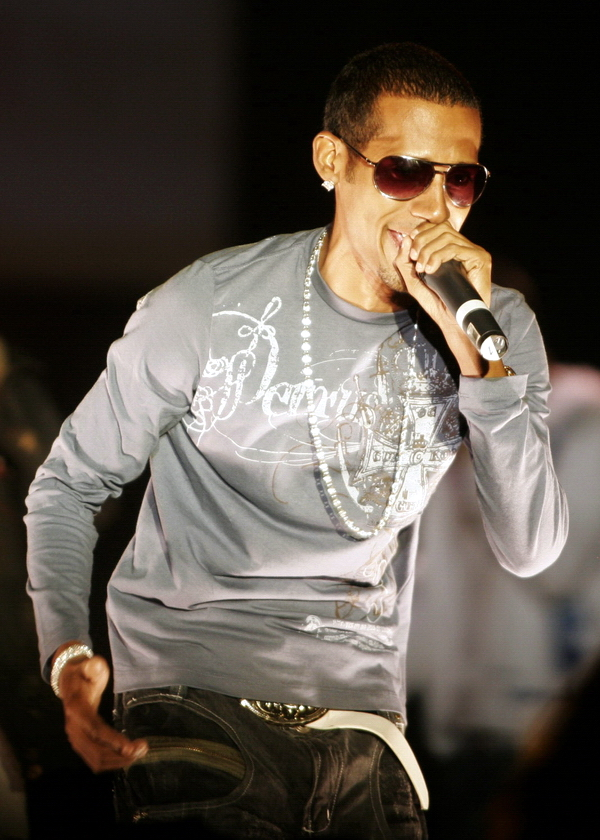 Fotografía tomada en el Global Peace Festival, Paraguay 2008.